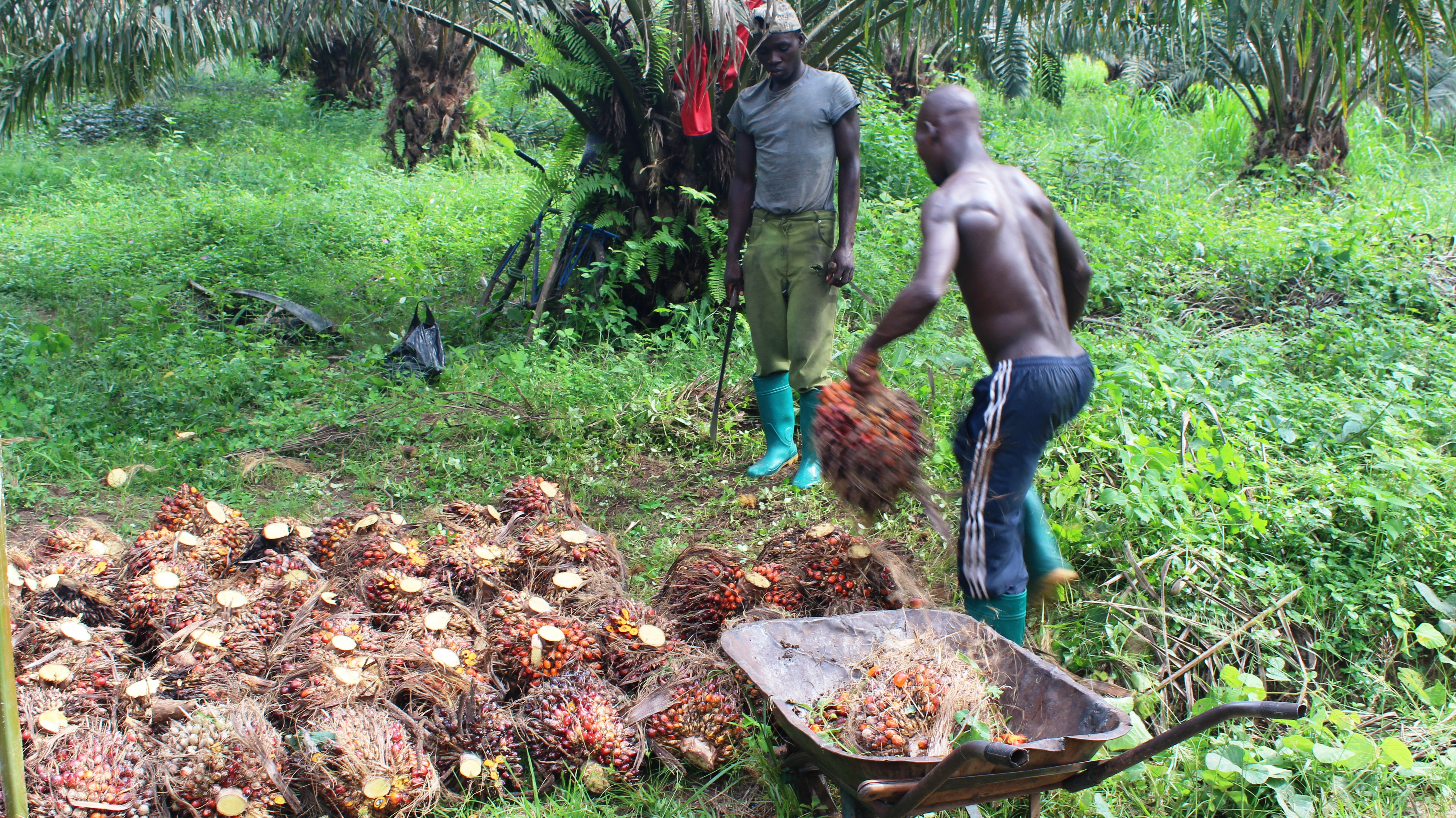 Les récolteurs rassemblent des régimes de palme. This is an image of "African people at work" from Ivory Coast